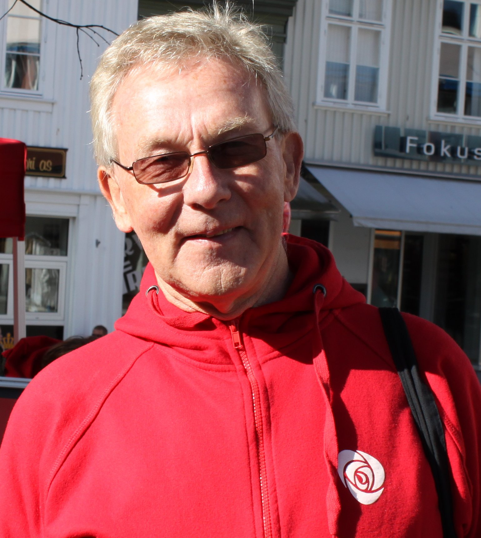 Steinar Gullvåg, stortingsrepresentant fra Vestfold. På stand i valgkampen 2009